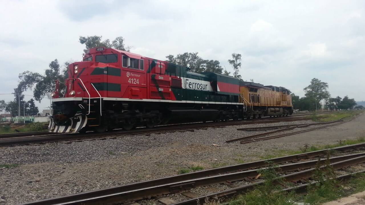 Ferrosur and Union Pacific